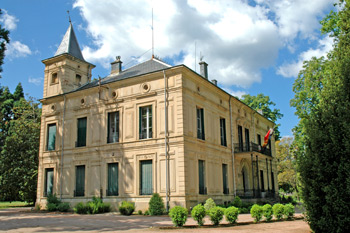 hotel de ville